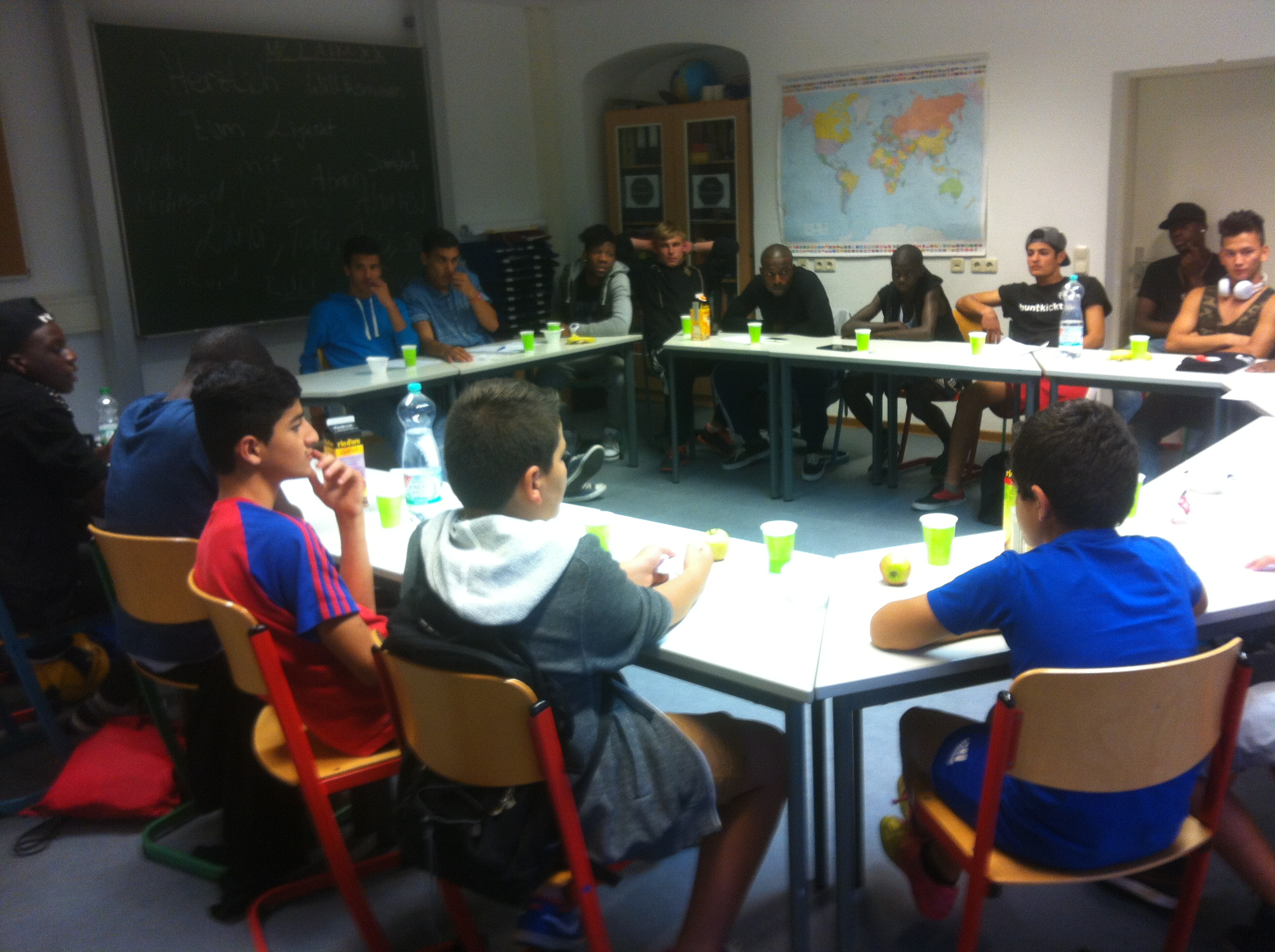 Beim Liga-Rat von buntkicktgut werden alle Problemsituationen aus dem Liga-Alltag besprochen.